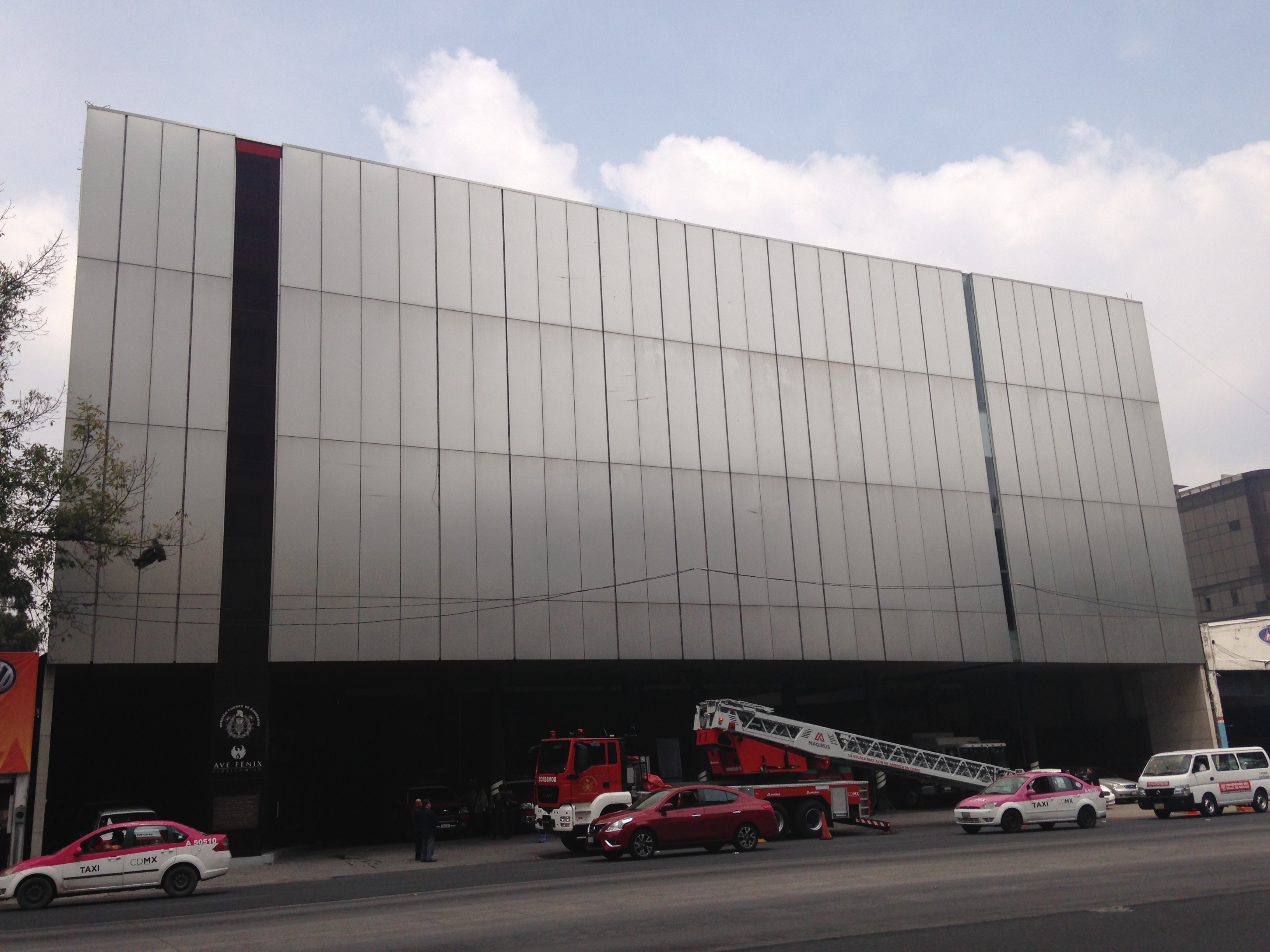 Estación Cuauhtémoc "Comandante Eulalio Mujica Pérez" del Heroico Cuerpo de Bomberos del Distrito Federal